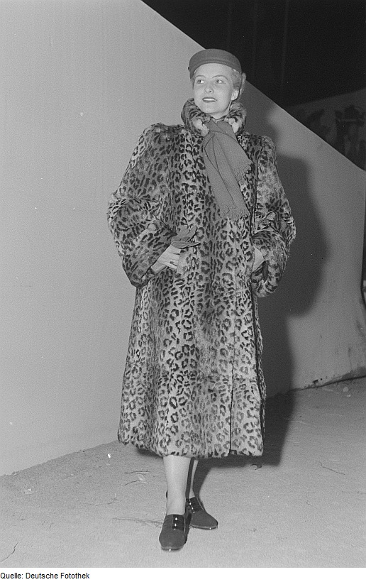 Original image description from the Deutsche Fotothek Modell während einer Modenschau im Pelzmantel